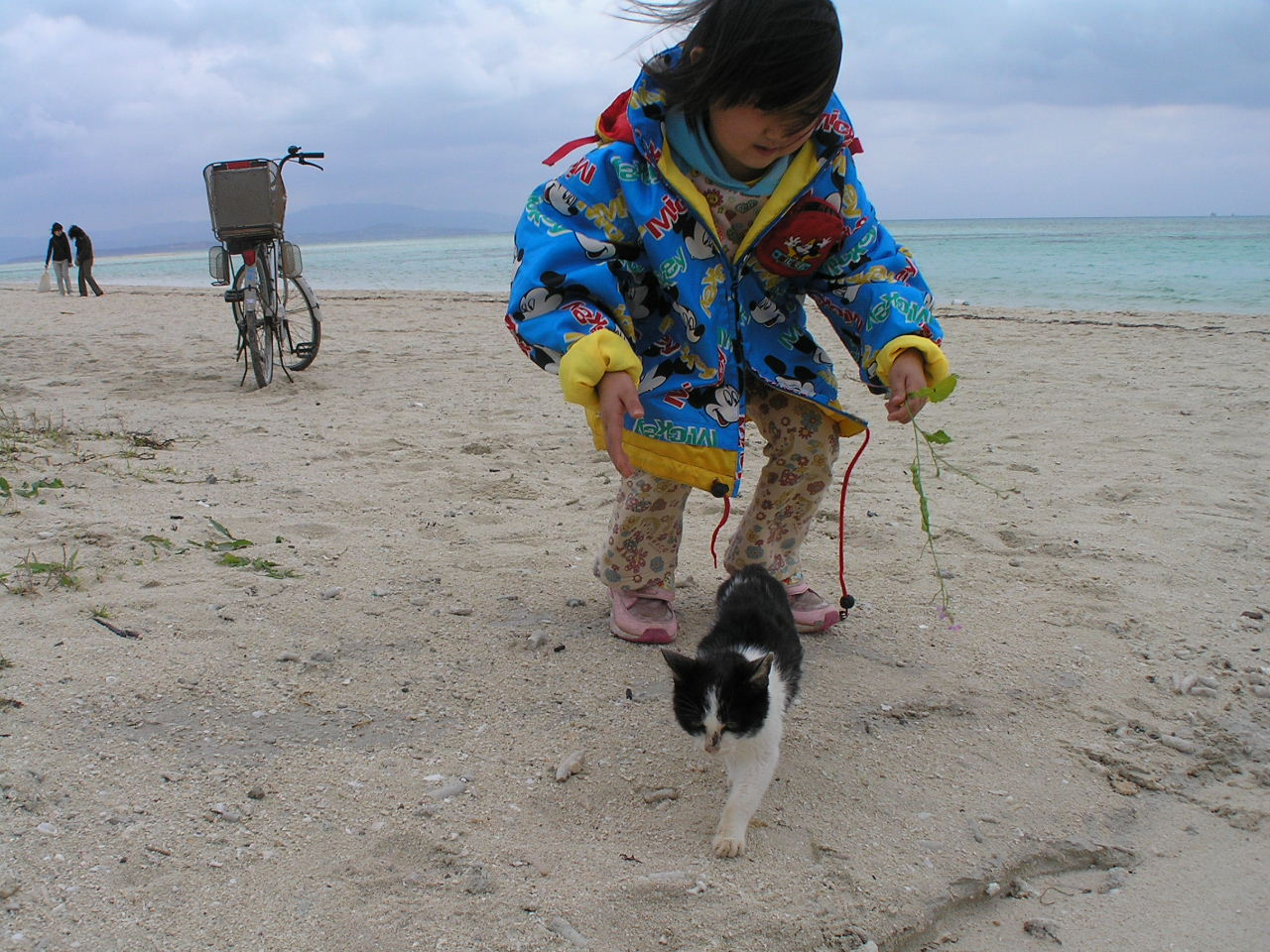 2006-01-23 Kondoi Beach Taketomi-Island,Okinawa コンドイ浜（沖縄県八重山郡竹富町竹富）少女と猫